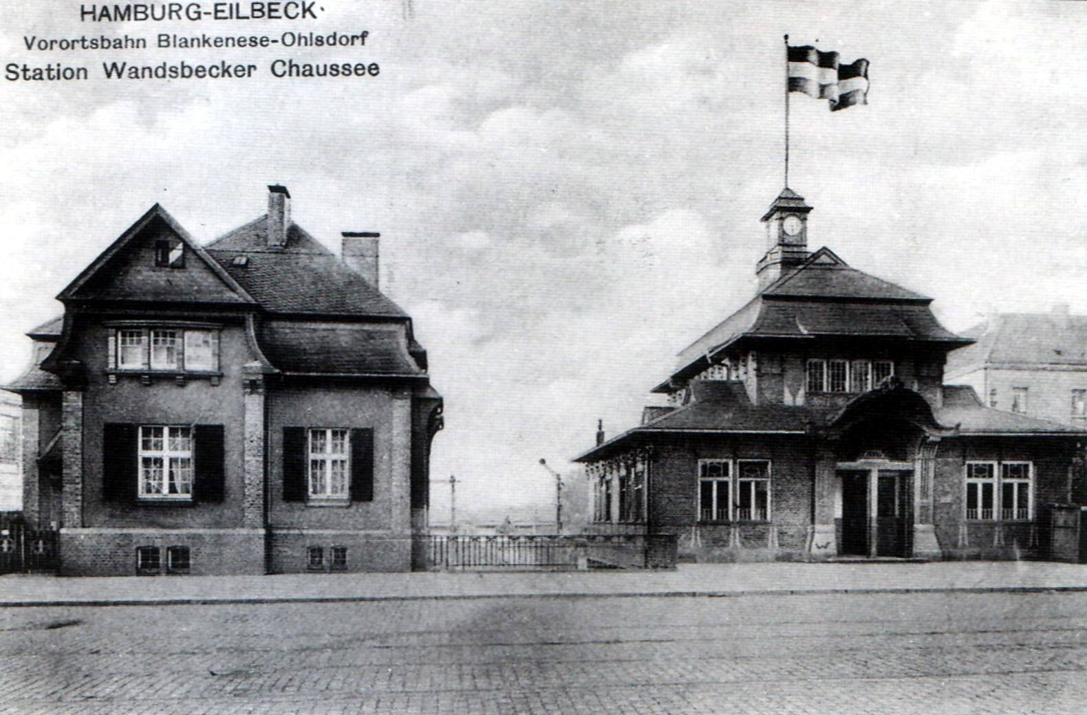 Bahnhof Wandsbeker Chaussee in Hamburg um 1900